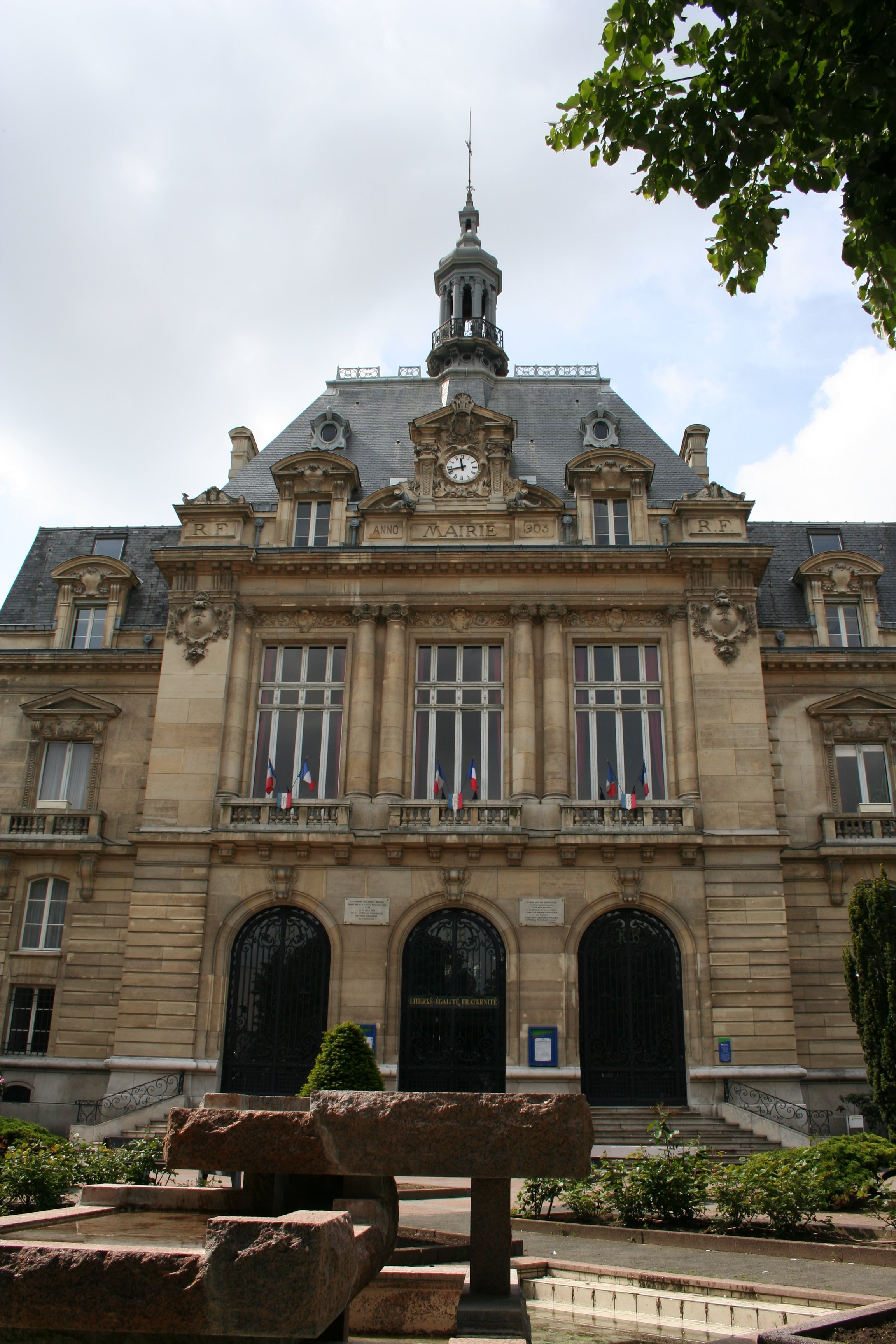 Mairie du Kremlin-Bicêtre (94), France.